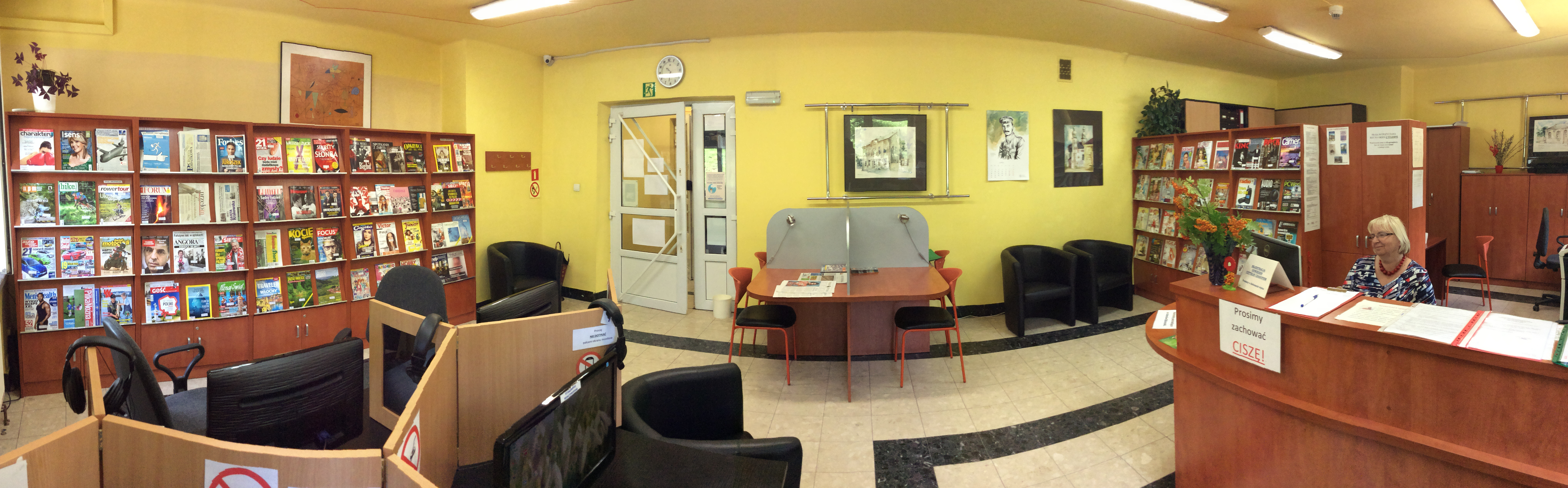 aktualizacja zdjęcia